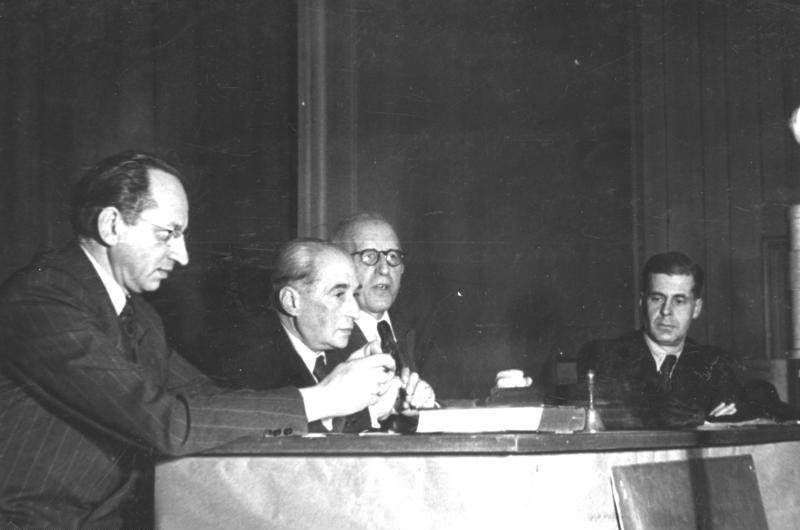 Illus/dpd-Bratke Berlin. Im RIAS fand am Sonnabend (15.1.49) eine öffentliche Diskussion über die neue Wirtschaftspolitik statt, an der von der SPD Bach, von der LPD Schwennicke, von der CDU Dibertius teilnahmen. 2685-49